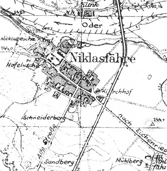 Mapa Mikolina z 1939 roku, wieś Mikolin, gmina Skorogoszcz, powiat brzeski, województwo opolskie